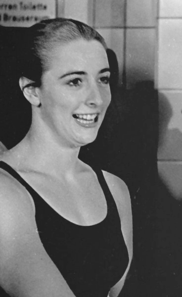 Sharon Stouder